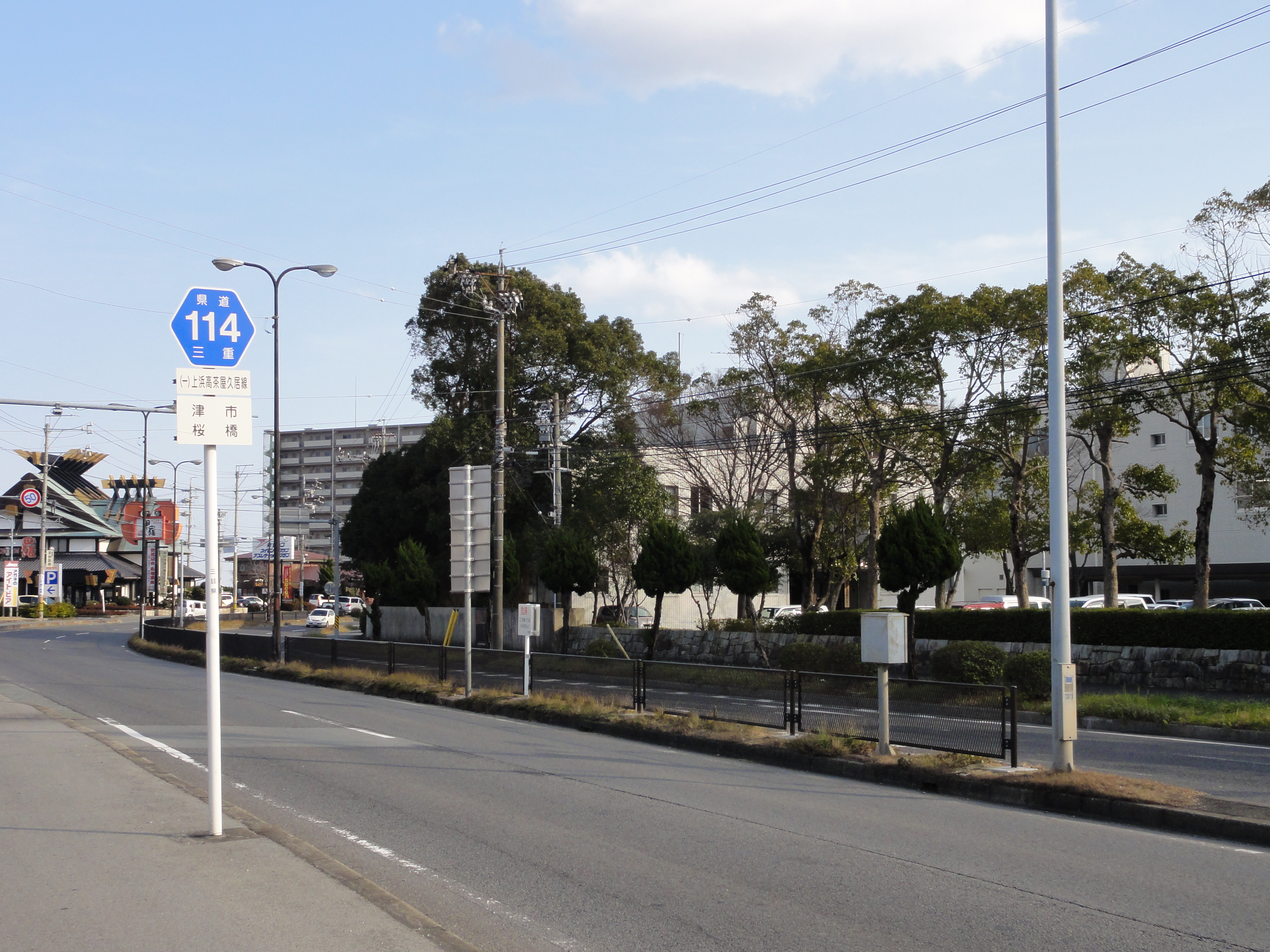 三重県津市上浜町二交差点付近の県道114号線標識です